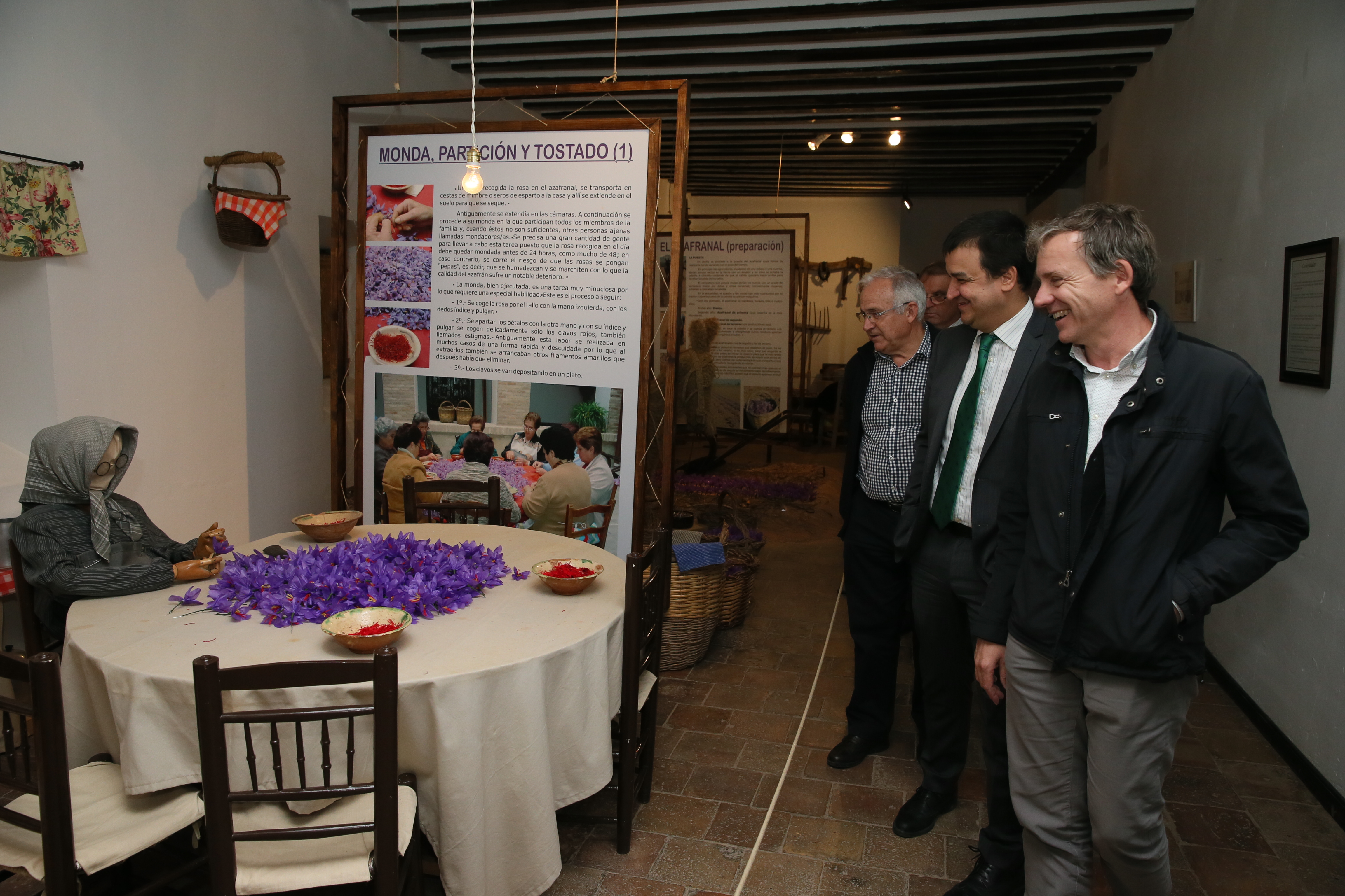 MADRIDEJOS (Toledo), 3 de noviembre de 2017.- El consejero de Agricultura, Medio Ambiente y Desarrollo Rural, Francisco Martínez Arroyo, asiste, en la localidad de Madridejos, a la recogida de la rosa del azafrán en el campo. (Fotos: Ignacio López // JCCM)